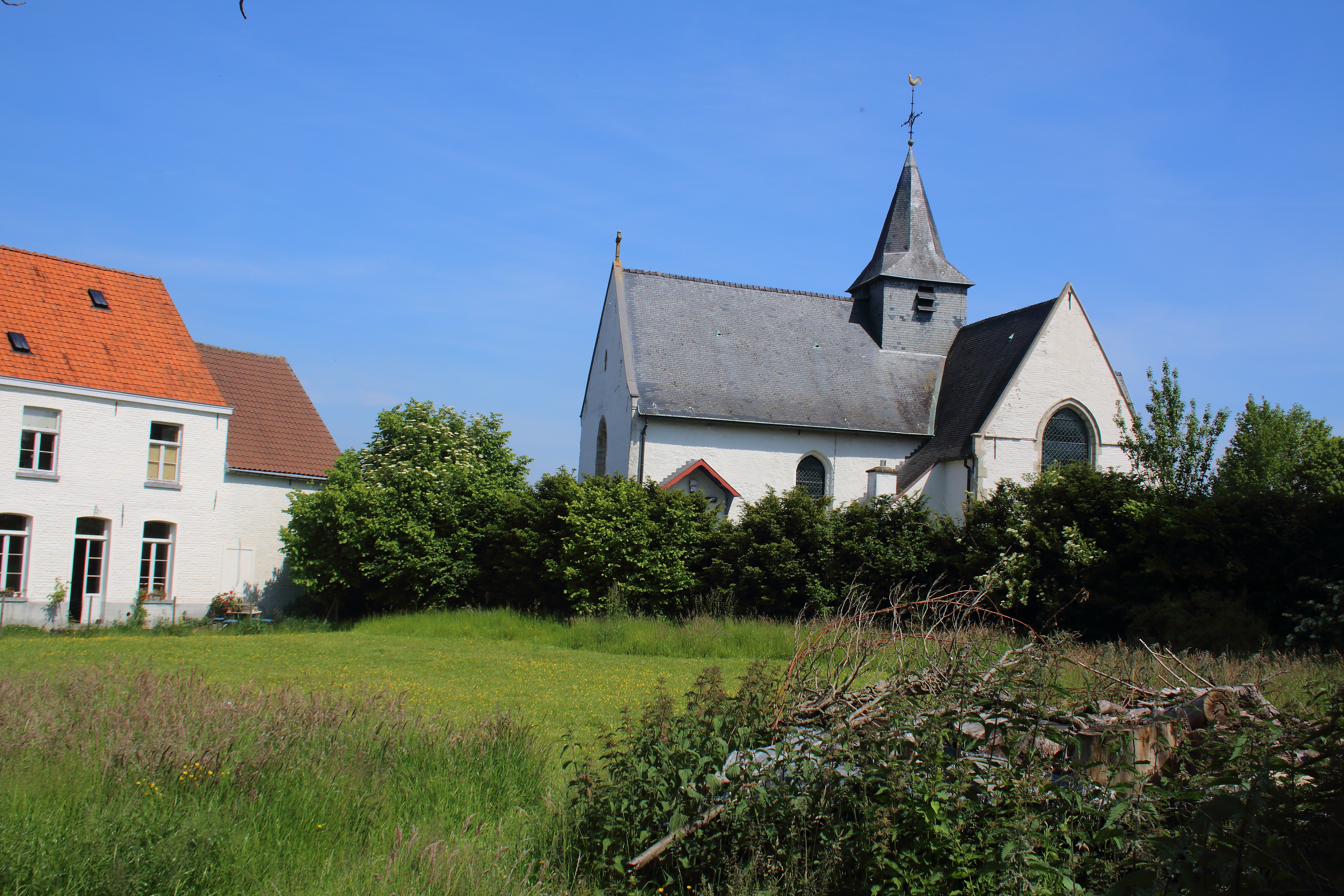 Volkegem, Oudenaarde, Vlaanderen, België